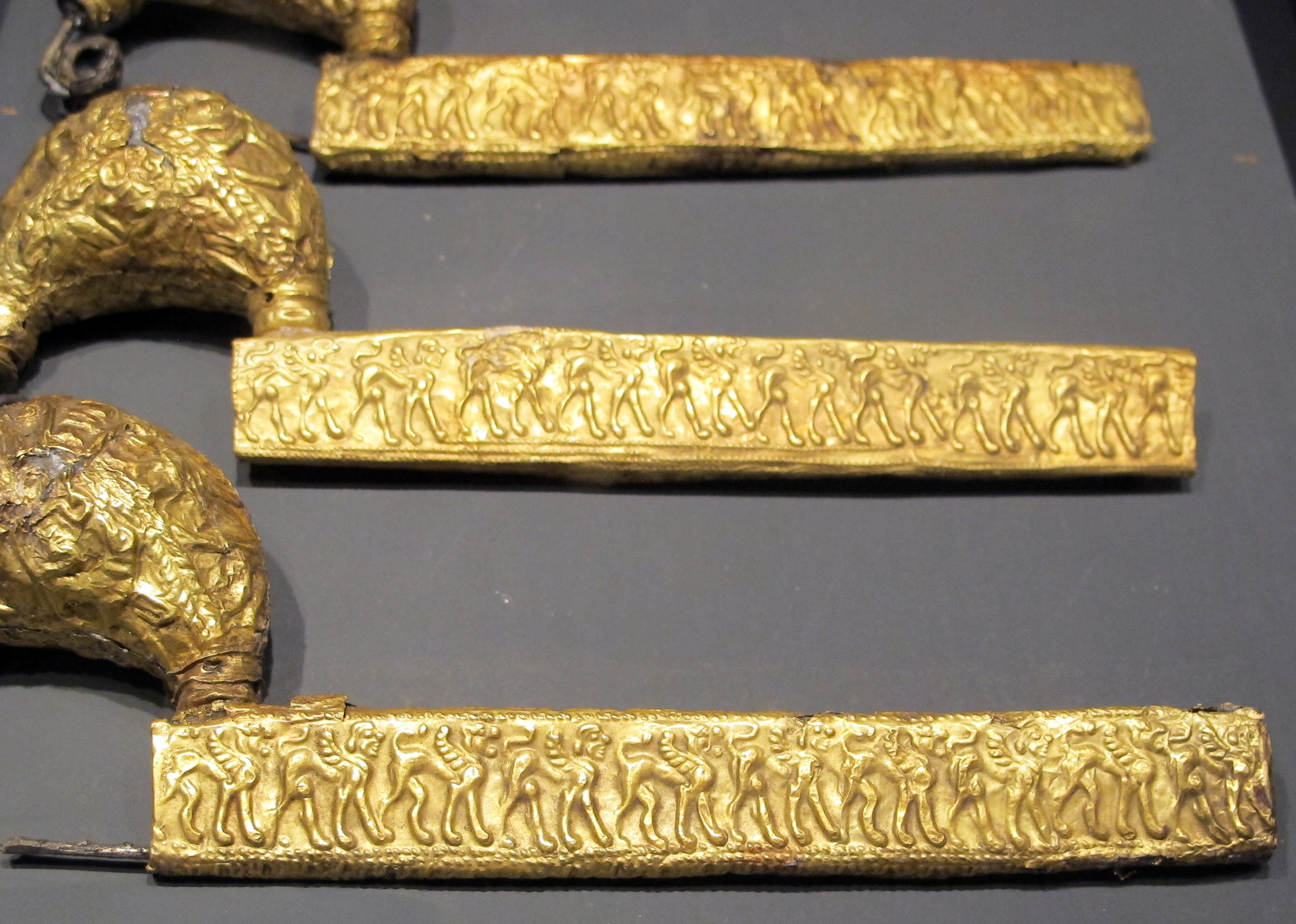 Vetulonia, tomba del littore, fibule d'oro